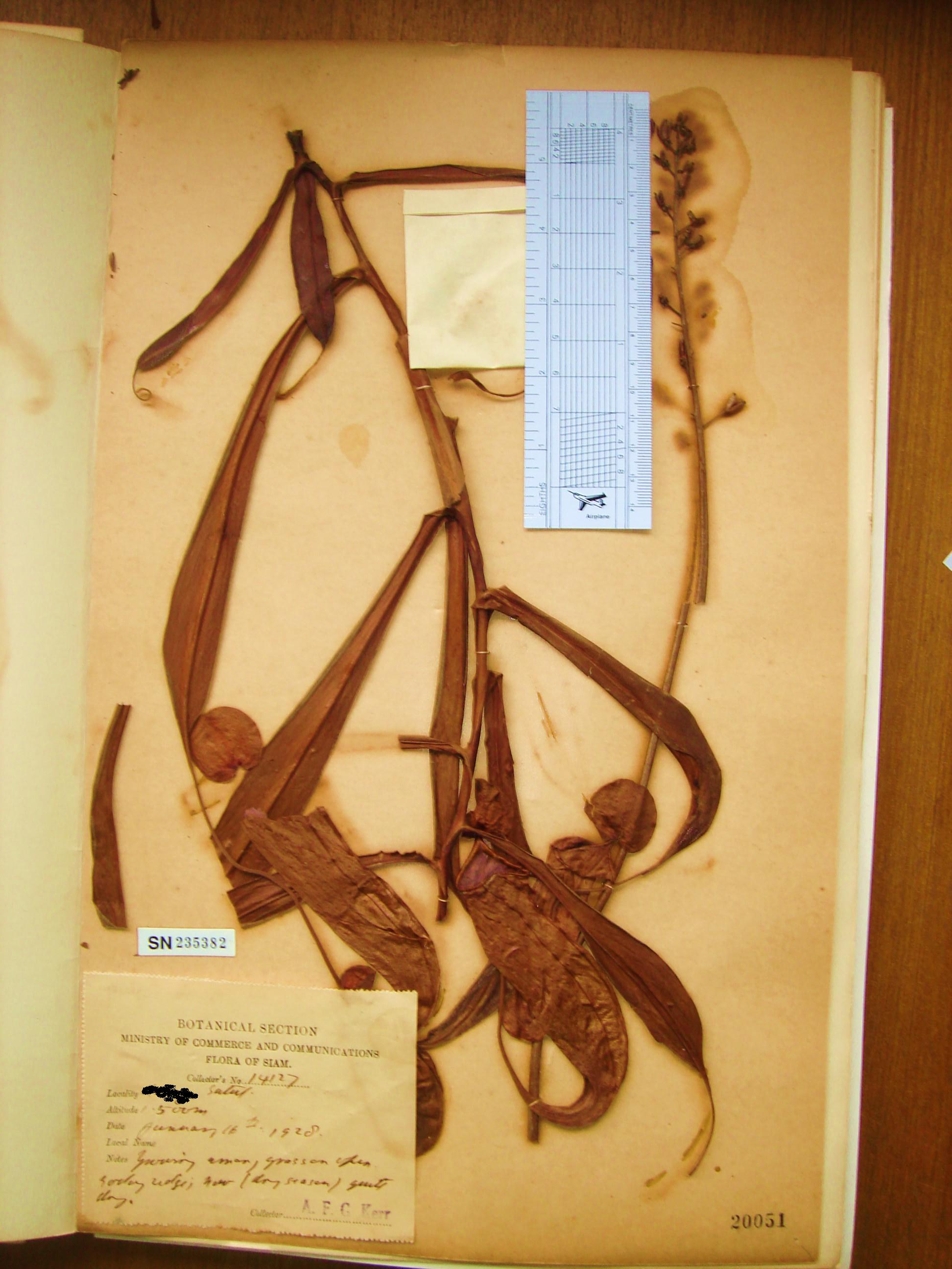 Nepenthes kerrii herbarium specimen (Kerr 14127)